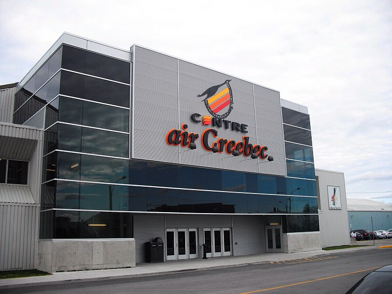 Vue sur la facade du centre Air Creebec, accueillant les Foreurs de Val d'Or, Québec, Canada.